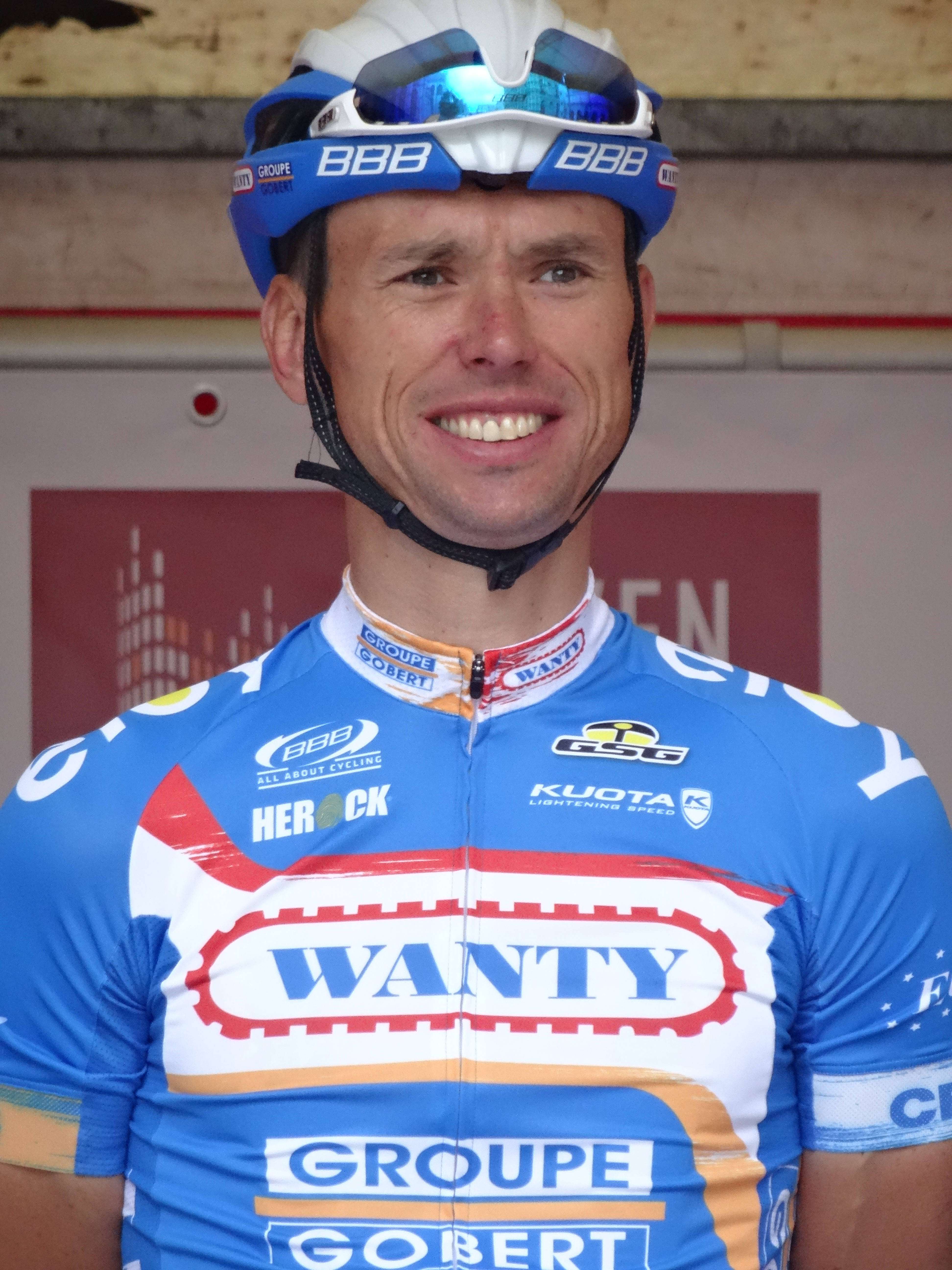 Reportage photographique réalisé le dimanche 14 septembre à l'occasion du départ et de l'arrivée du Grand Prix Jef Scherens 2014 à Louvain, Belgique.